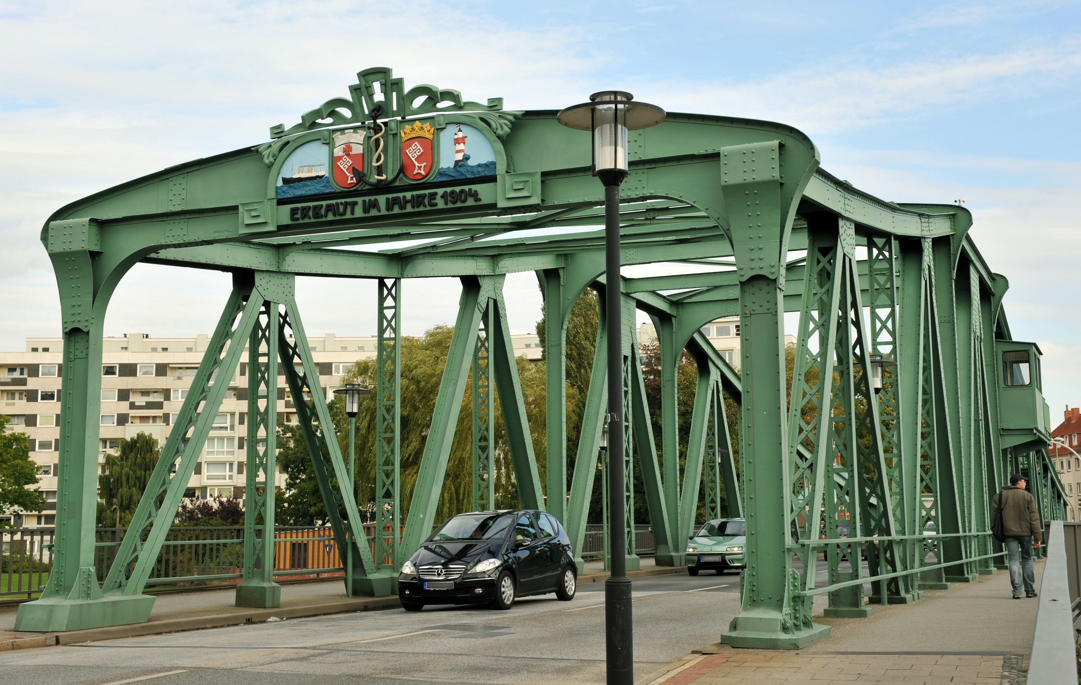 Historical building in Bremerhaven, northern Germany Alte Geestebrücke, Fährstraße, 1904 Das abgebildete Objekt ist ein geschütztes Kulturdenkmal in der Freien Hansestadt Bremen, mit der Nr. 1635 beim Landesamt für Denkmalpflege registriert.